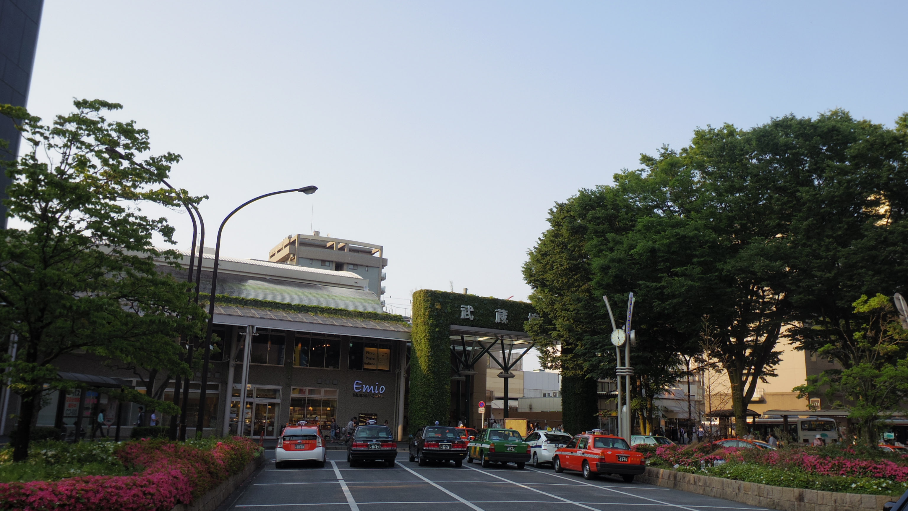 JR・西武武蔵境駅南口駅舎（2016年5月22日撮影）